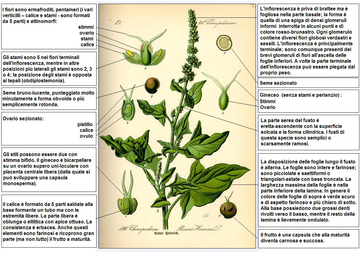 Chenopodium bonus-henricus